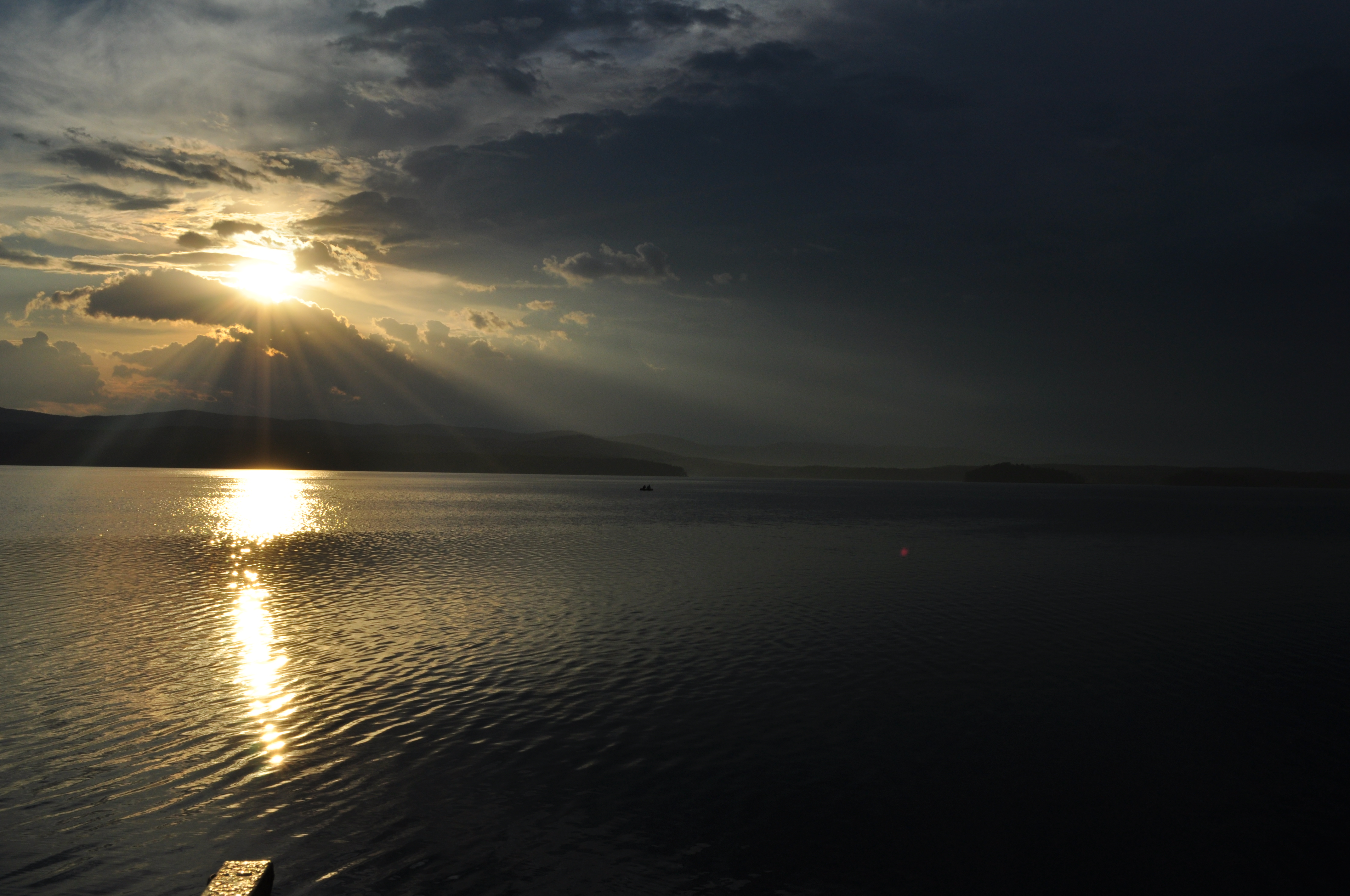 Солнце село. Кисегач